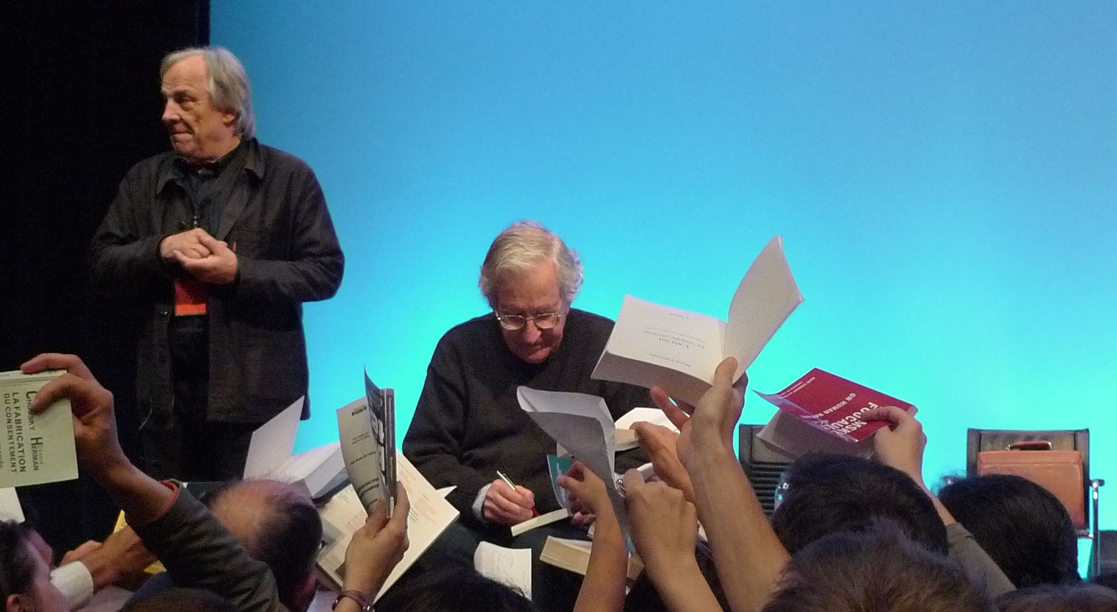 Noam Chomsky dédicace ses livres à la Mutualité à Paris le 29 mai 2010. Debout à sa droite se tient le journaliste français Daniel Mermet.